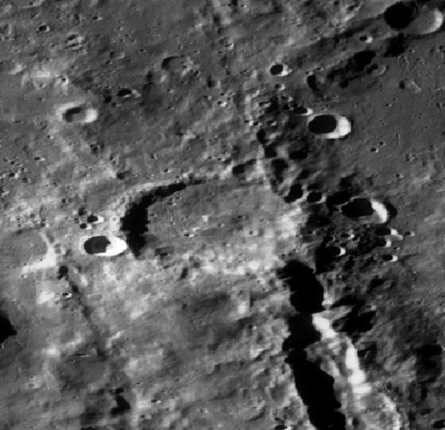 Cráter lunar Fechner. (Imagen LRO)